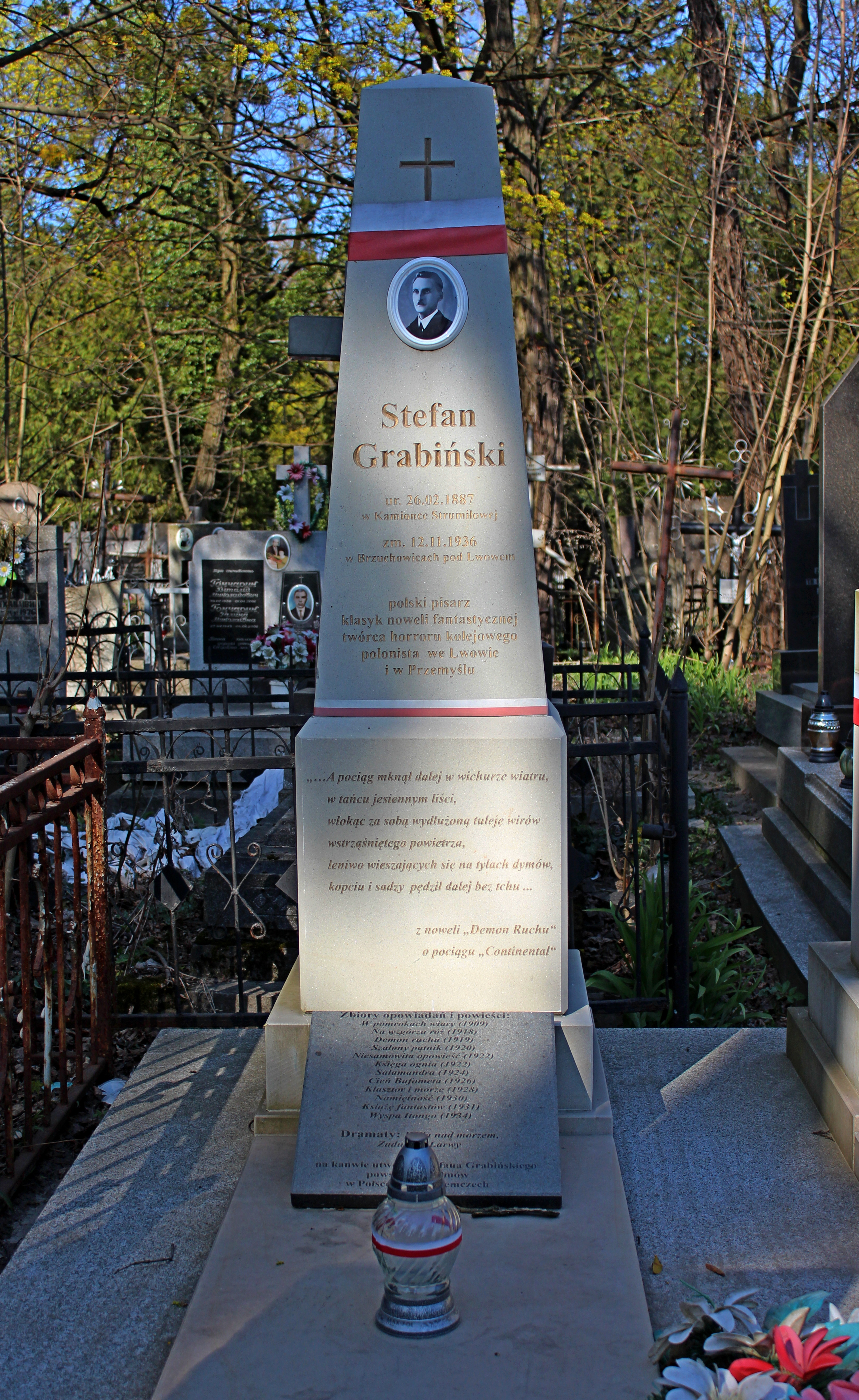 Надгробок письменника С. Грабінського. Янівський цвинтар , поле №11.